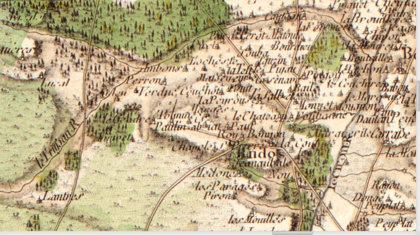 Carte de Cassini n°105 (Gironde, zoom sur Budos), 1756.